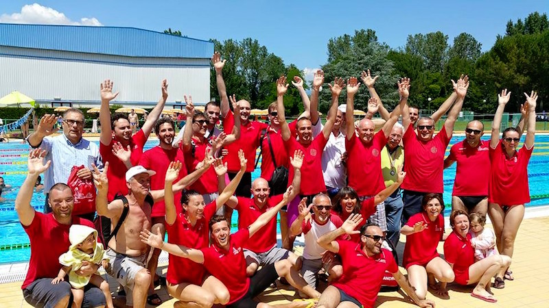 parte della squadra 2017